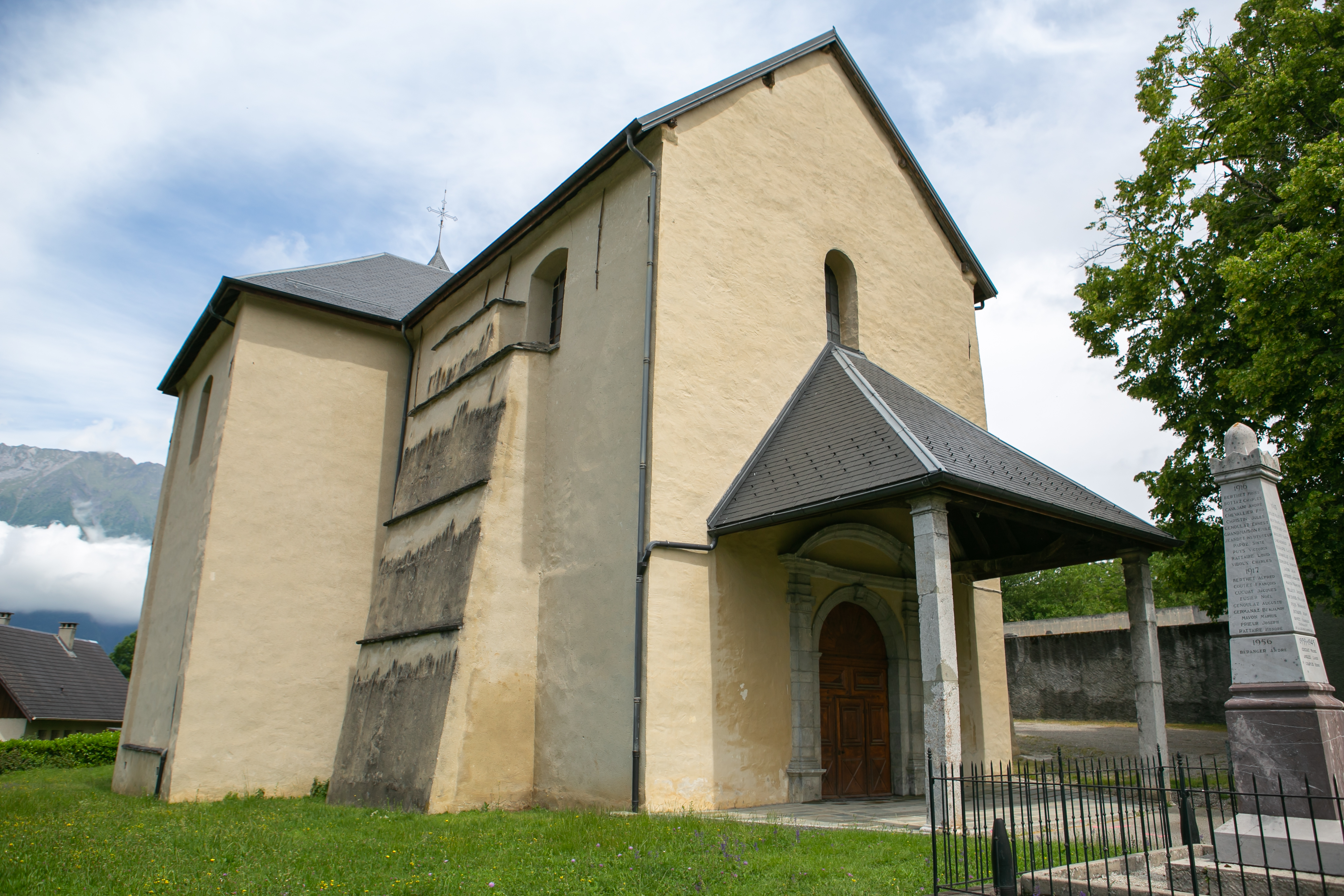 Vue de l'église Saint-Laurent d'Aiton / Aiton / Savoie / France